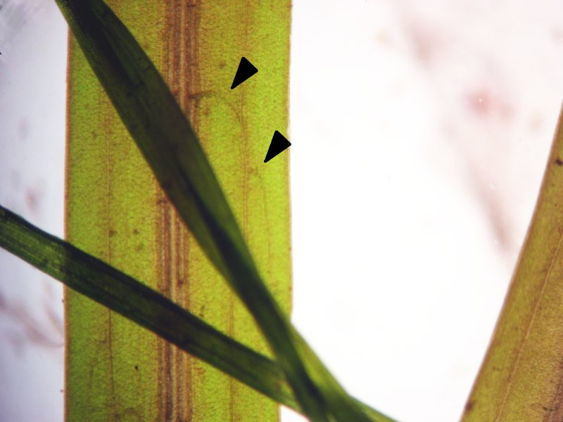 abgehende Mittelnerven eines Blattes des Stachelspitzigen Laichkrauts Potamogeton friesii, Müritz-Gebiet